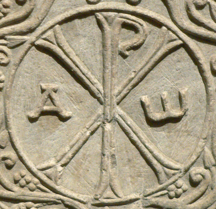 Sarcophage de Drausin, détail Cuve de sarcophage VI° siècle Marbre Provenance : Soissons L.: 2,12 m, l.: 0,76 m, H.: 0,53 m Décoré d'un chrisme et de pampres de vigne. Il aurait, selon la tradition, contenu le corps de Drausin ,évêque de Soissons, mort v. 680 Ma 2955 Musée du Louvre, Denon, Rez-de-Chaussée, salle 28.